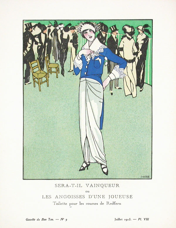 Fashion plate illustrating a dress by Redfern Title: "Sera-t-Il Vainqueur, ou Les Angoisses d'une Joueuse. Toilette pour les Courses des Redfern."